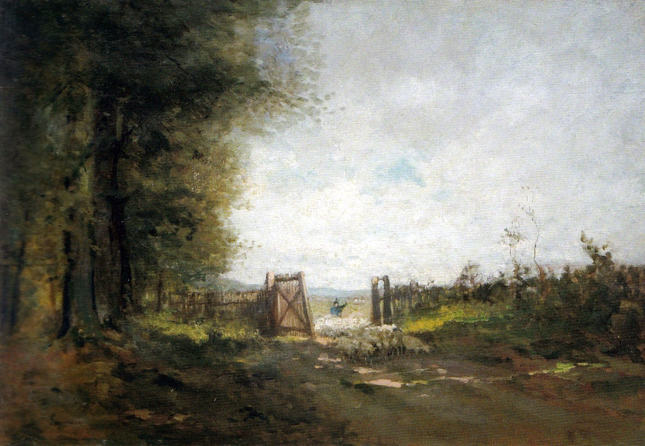 Peisaj cu turmă de oi, ulei pe lemn - Galeria de Artă Românească Modernă de la Muzeul Național de Artă al României